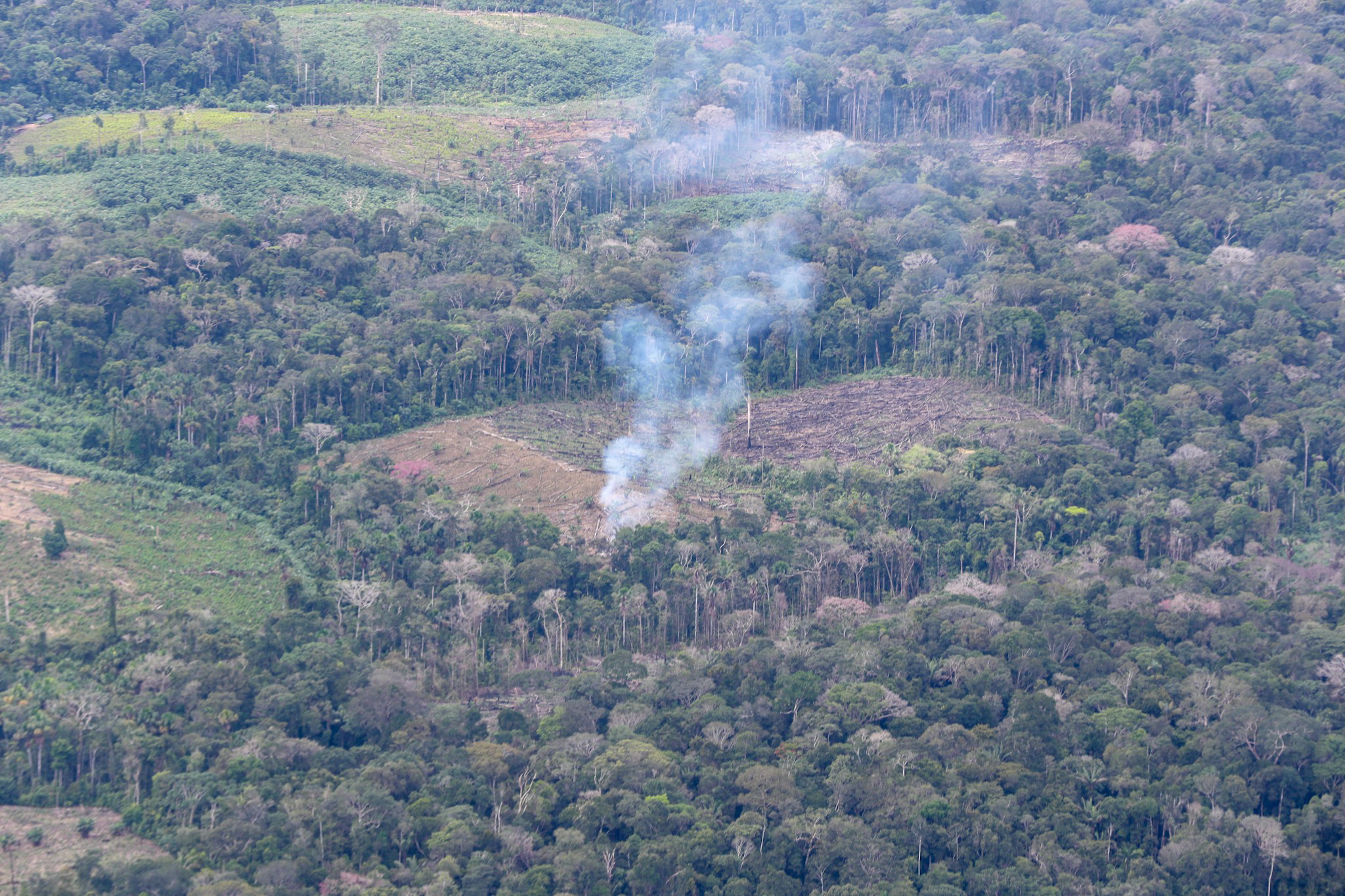 L'opération Armaggedon est une opération militaire péruvo-colombienne ayant eu lieu en 2018 pour neutraliser des narcotrafiquants installés dans la forêt de Putamayo, près de la frontière tripartite.